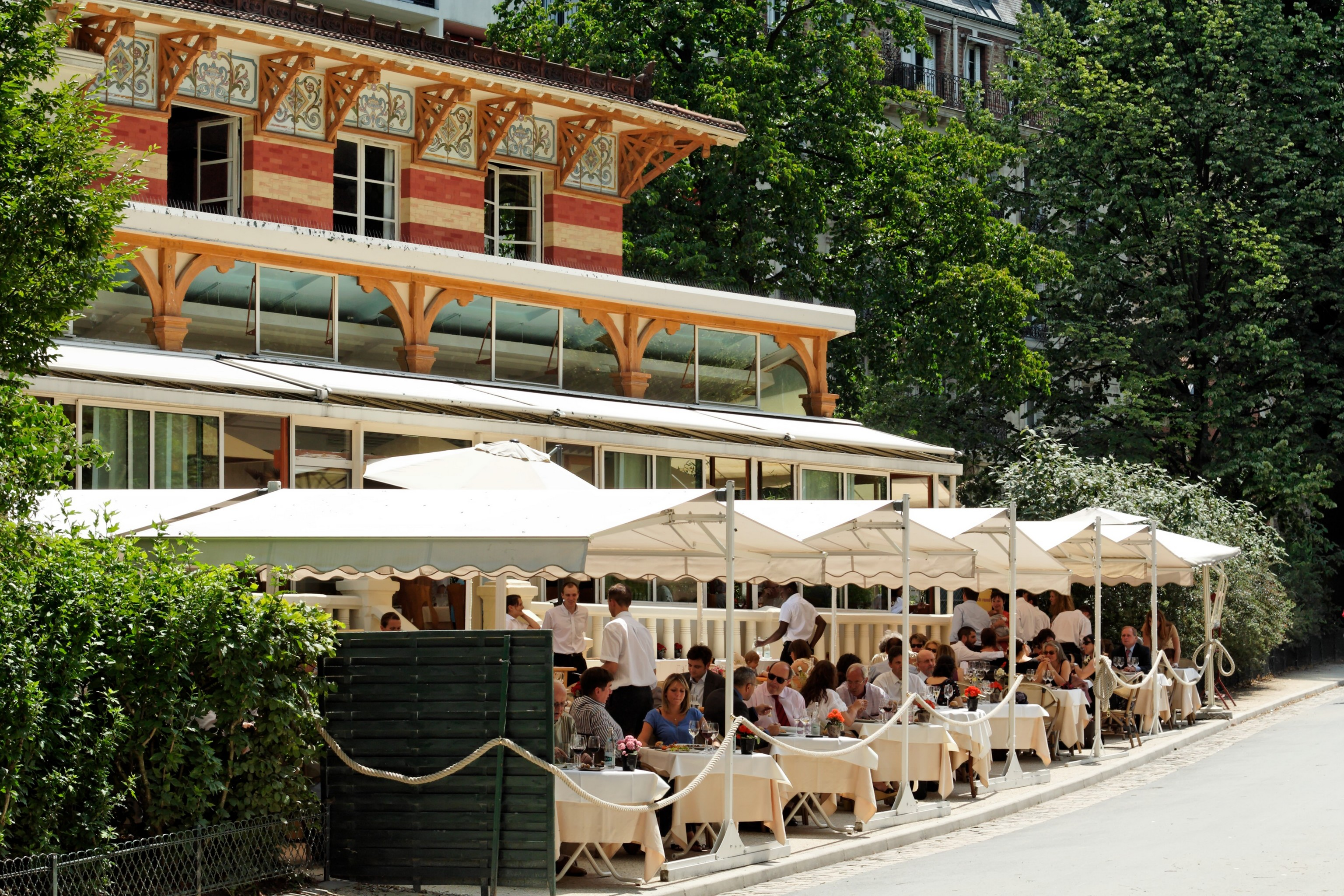 Le pavillon Montsouris dans le parc Montsouris, Paris, France.